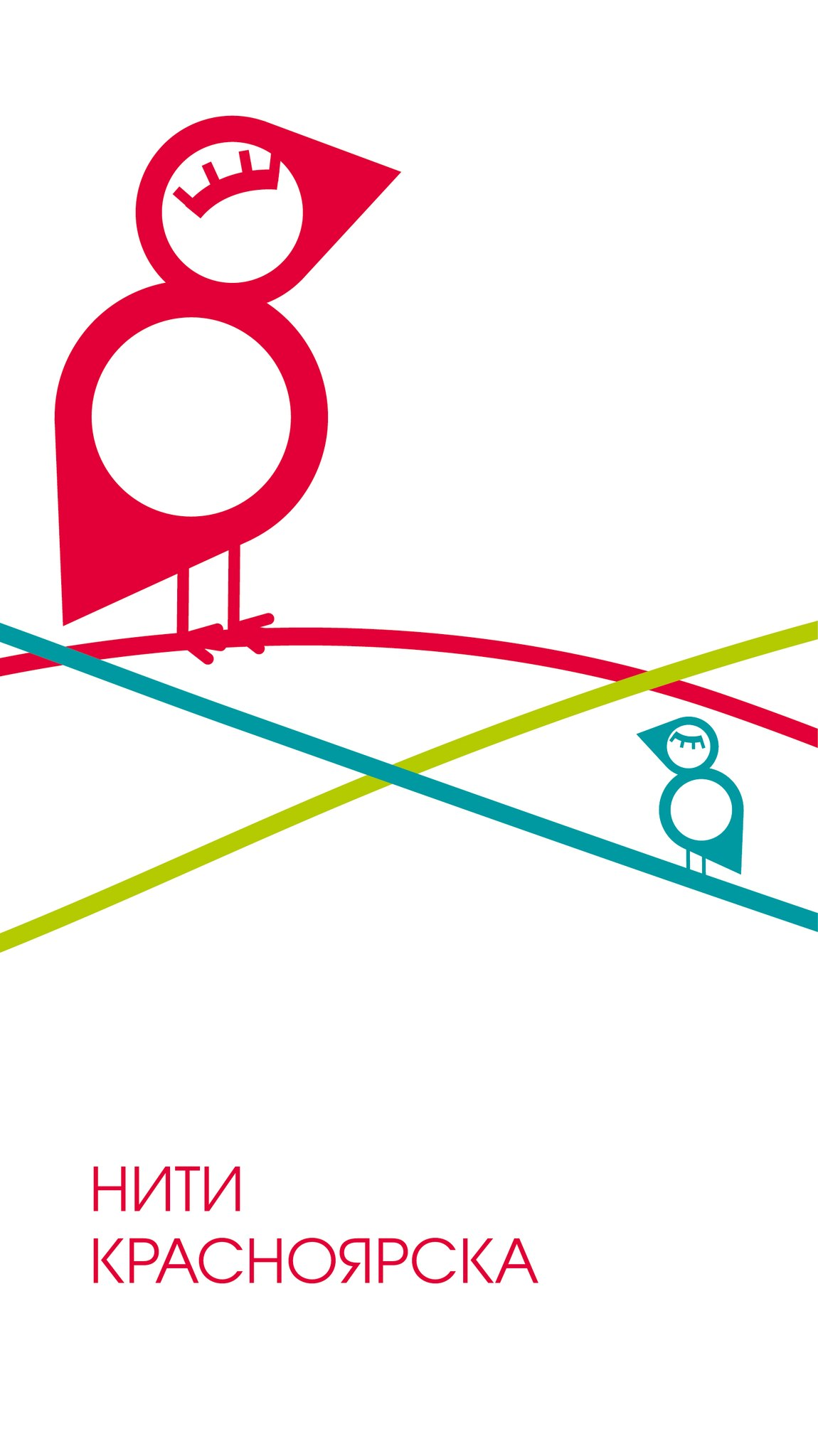 Эмблемой проекта является птичка из значков, используемых для отметок на карте, и три линии, символизирующие маршруты проекта.